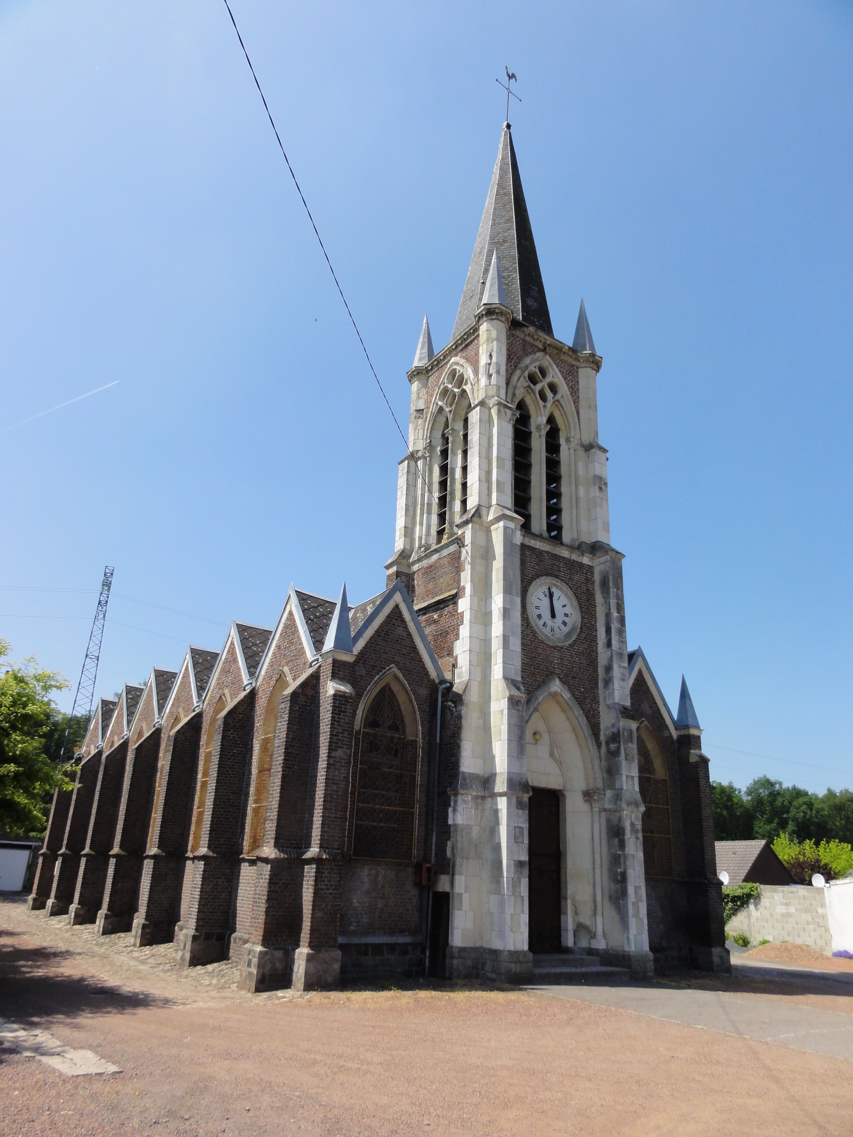 Église Sainte-Barbe et presbytère de la Compagnie des mines de Vicoigne dans le bassin minier du Nord-Pas-de-Calais, hameau de Vicoigne, Raismes, Nord, Nord-Pas-de-Calais, France.